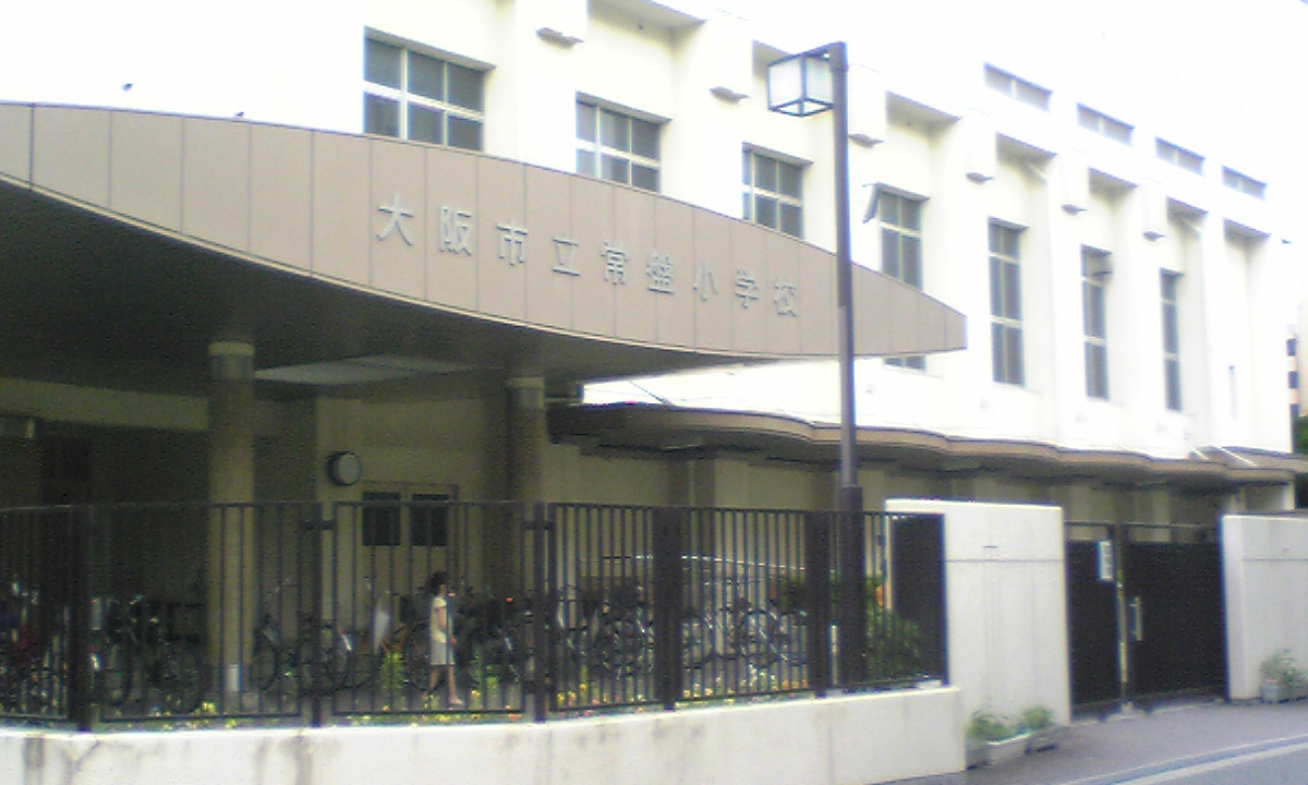 大阪市立常盤小学校